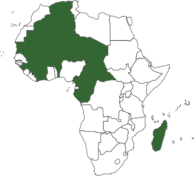 Africa Gabacha